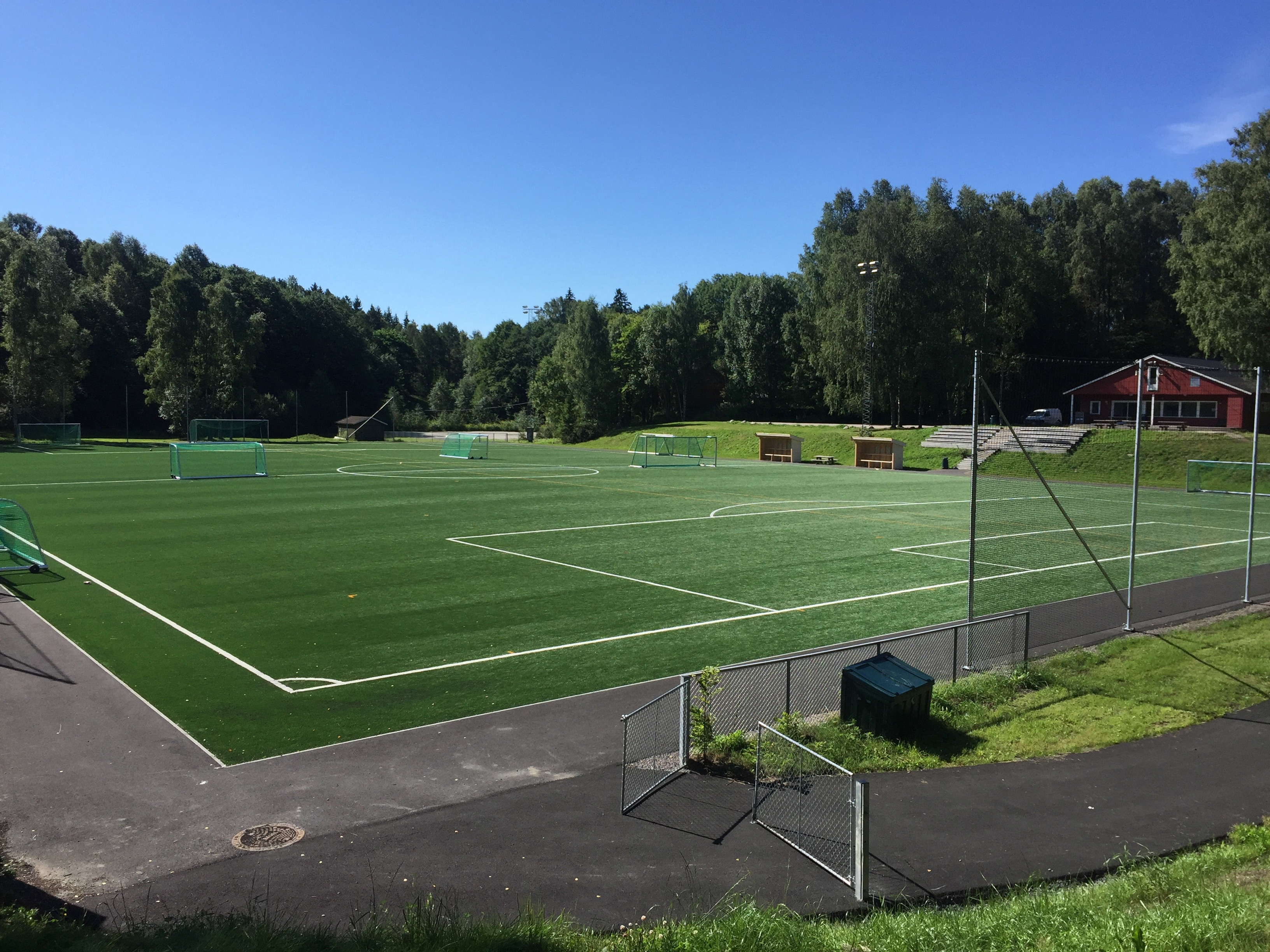 Hallagerbanen i Bydel Søndre Nordstrand i Oslo.